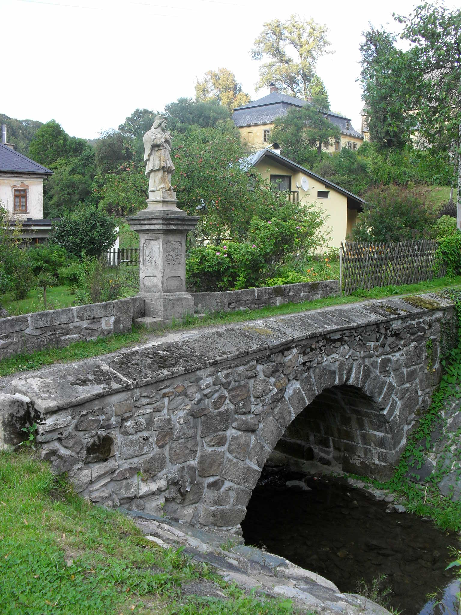 Barokní mostek s kopií sochy Jana Nepomuckého v Kryštofově Údolí